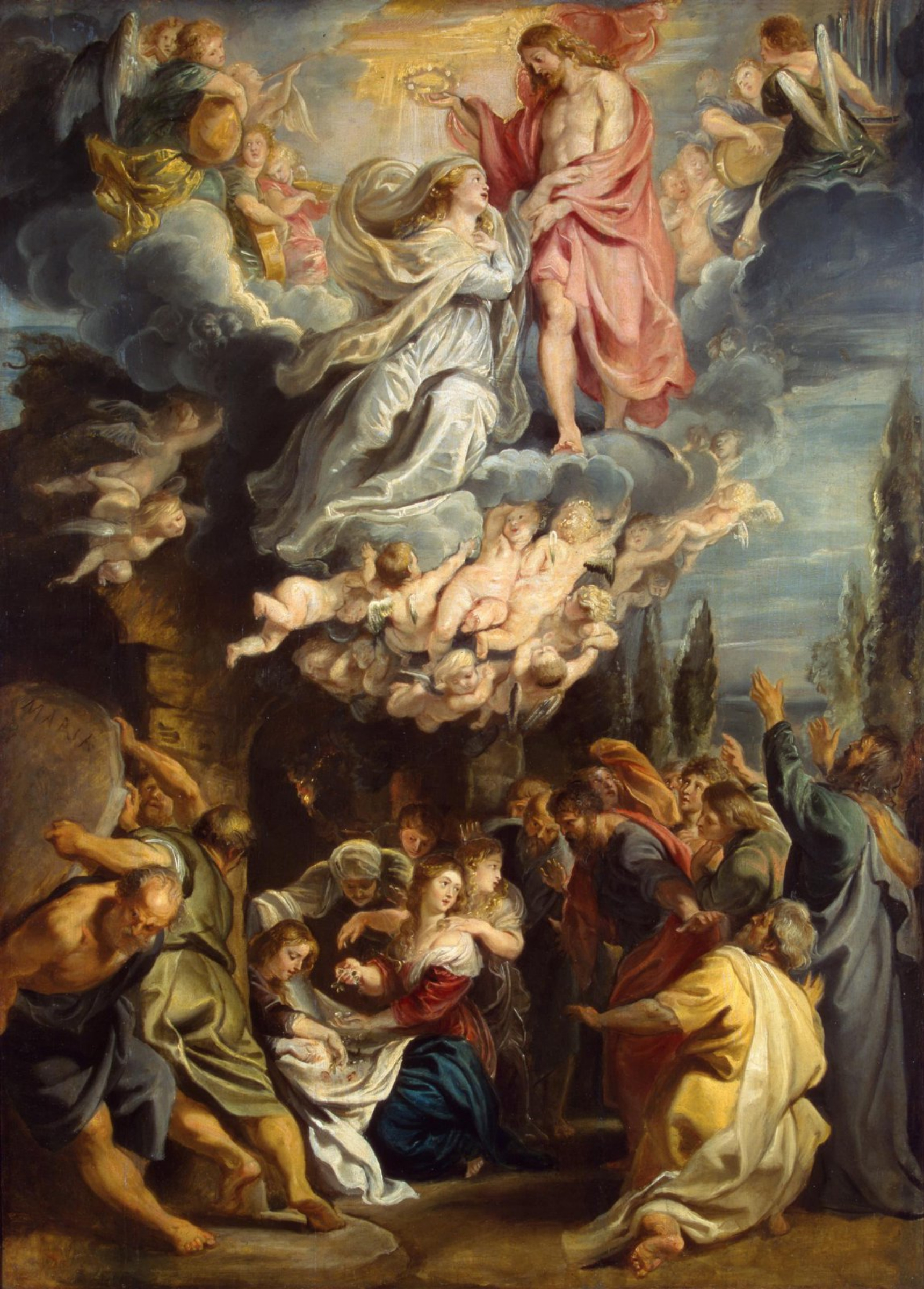 Koronacja Najświętszej Marii Panny